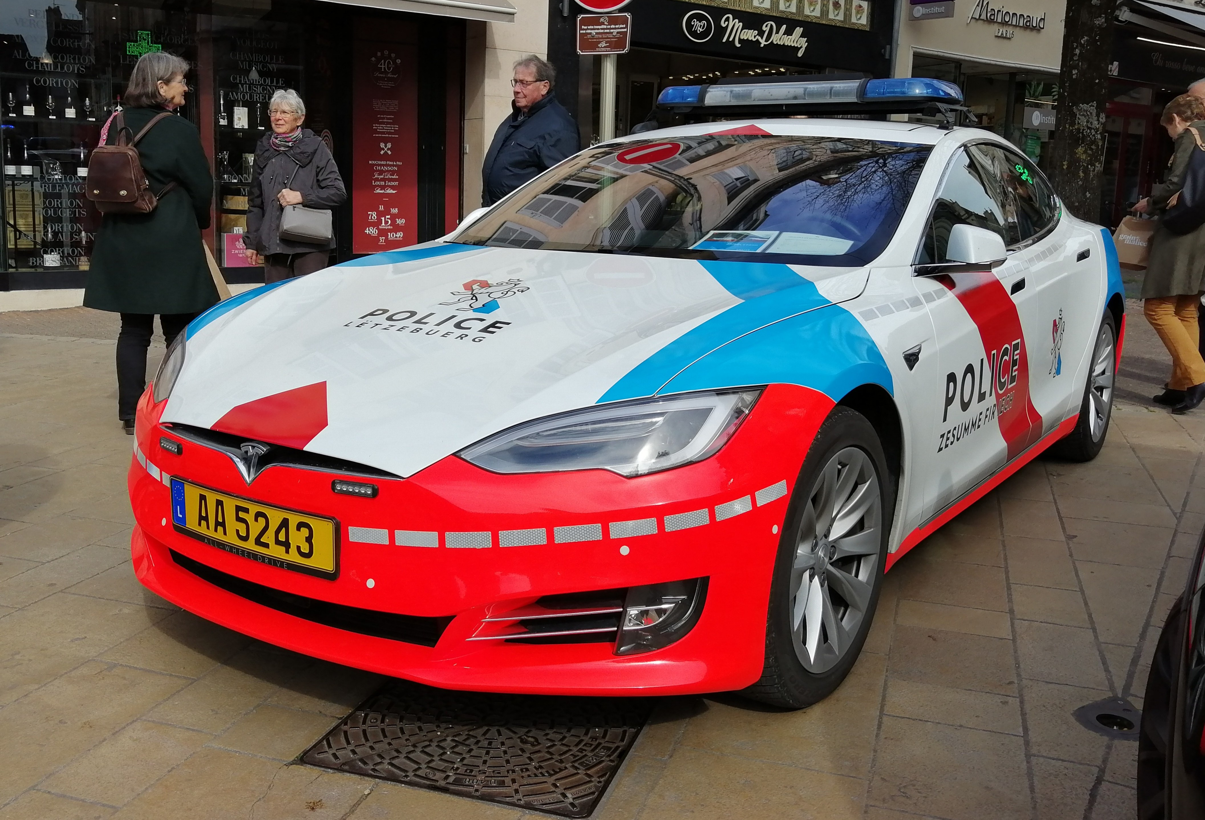 sdr